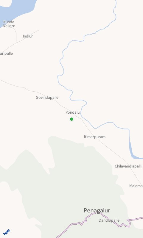 పొందలూరు